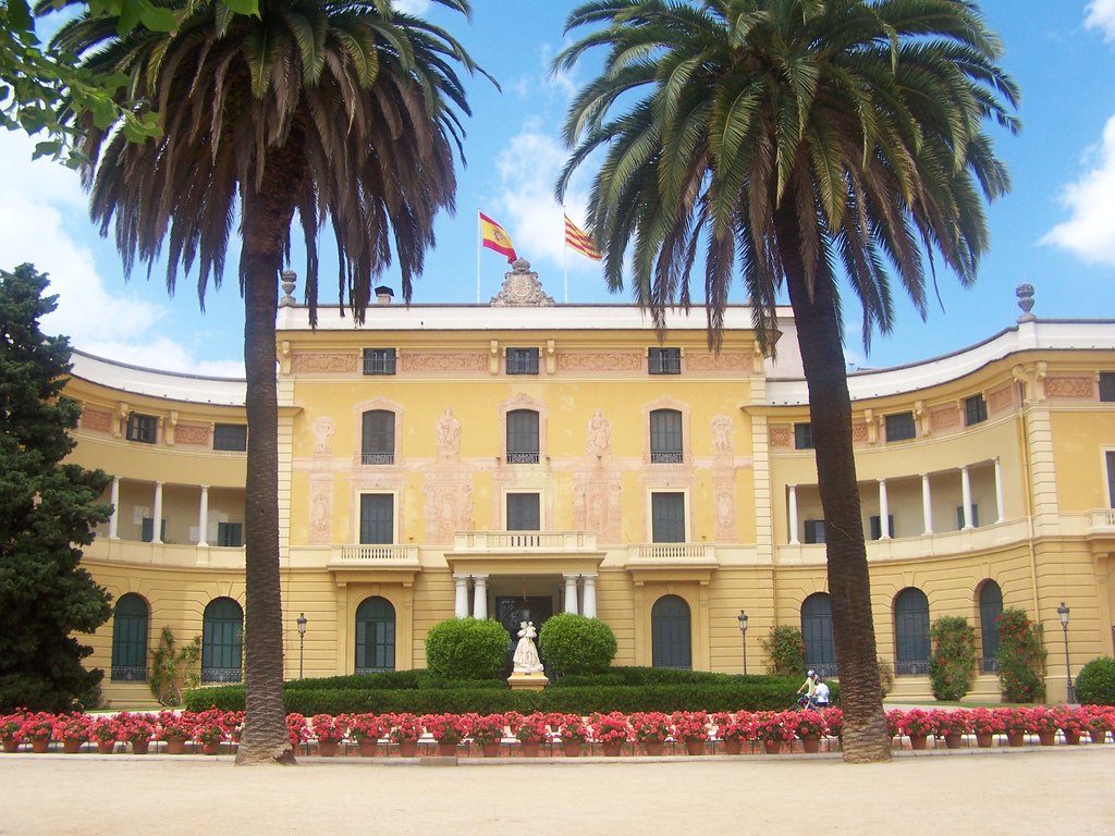 Palau Reial de Pedralbes (Barcelona), obra de Francesc de Paula Nebot & Eusebi Bona